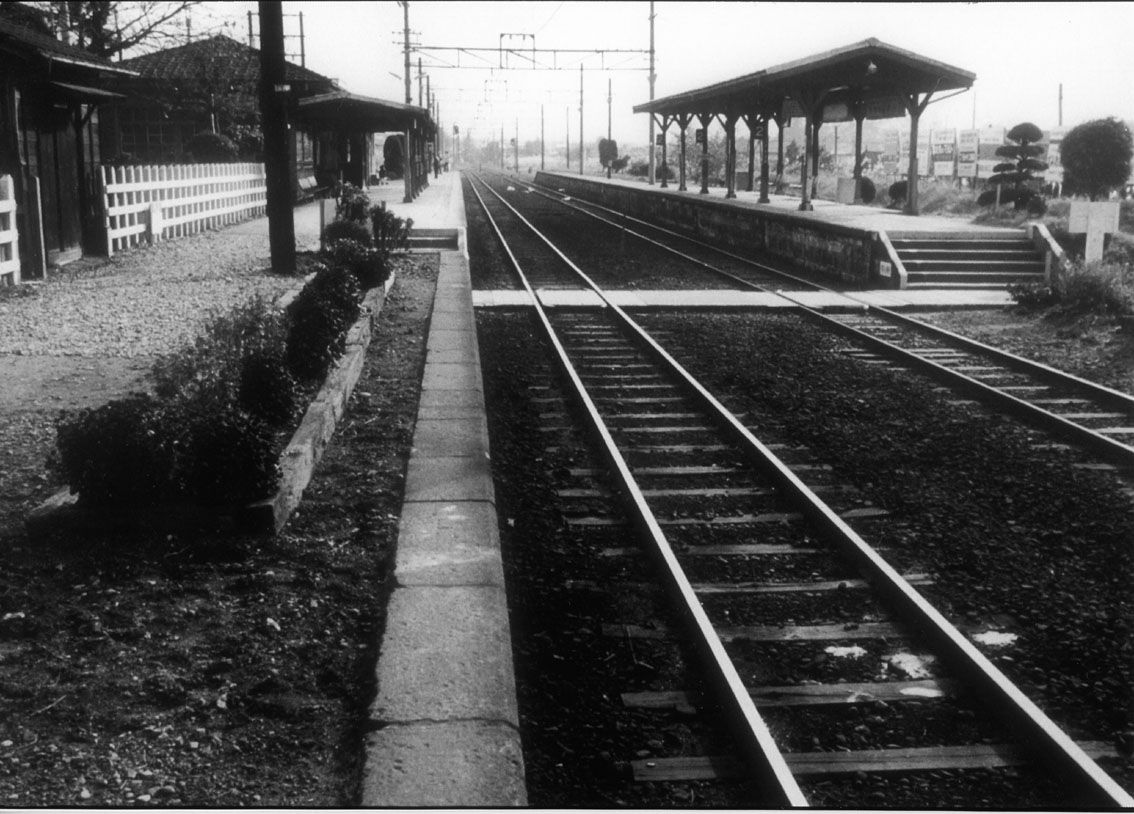 相原駅の構内。昭和47年撮影。